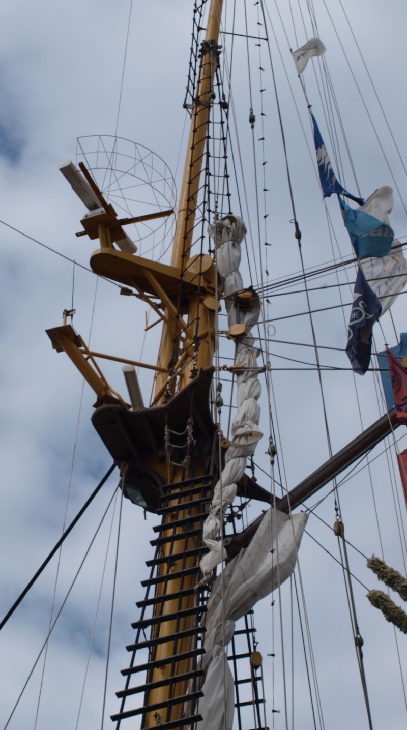 Vevlingar på ein bark